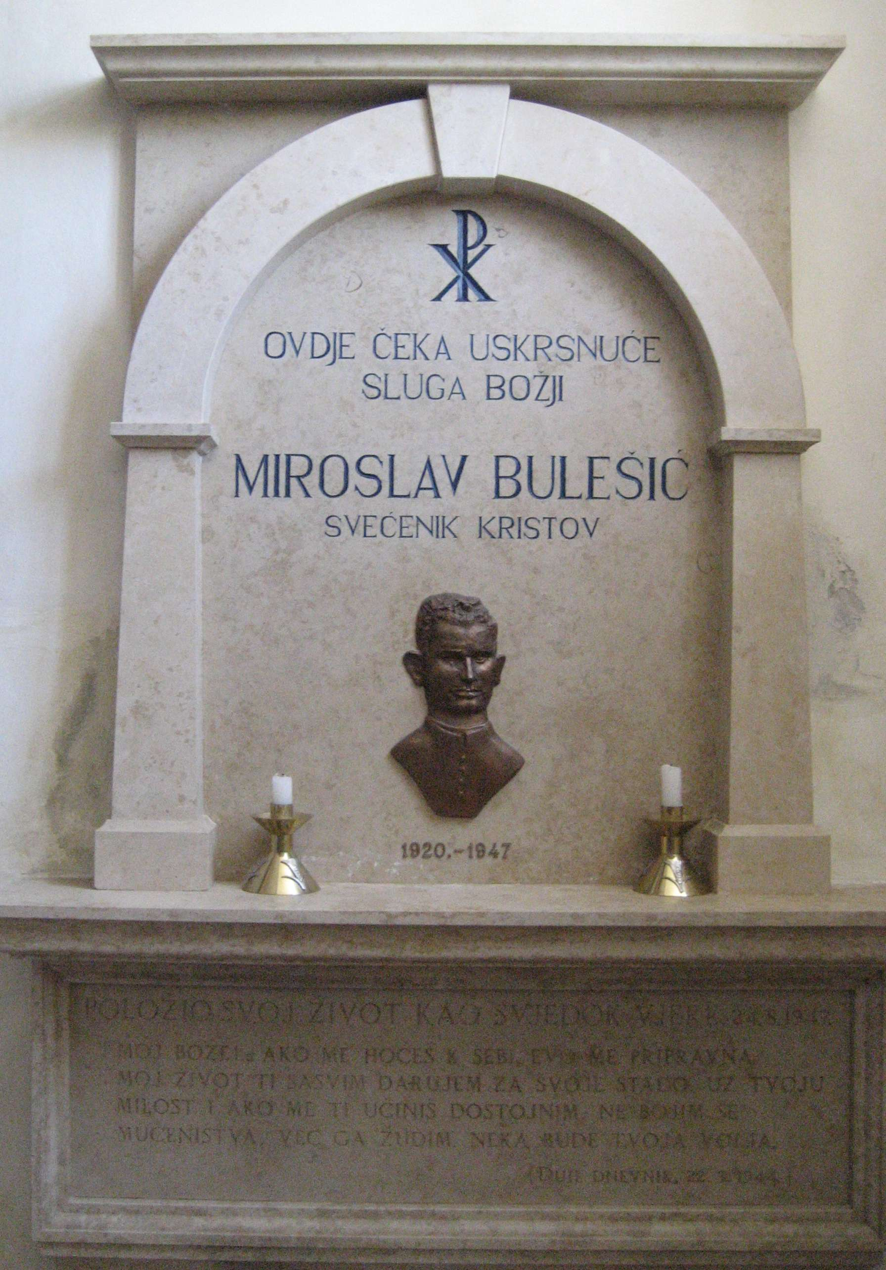 Gedenktafel für Miroslav Bulesic in der Kirche von Svetvinčenat, Kroatien